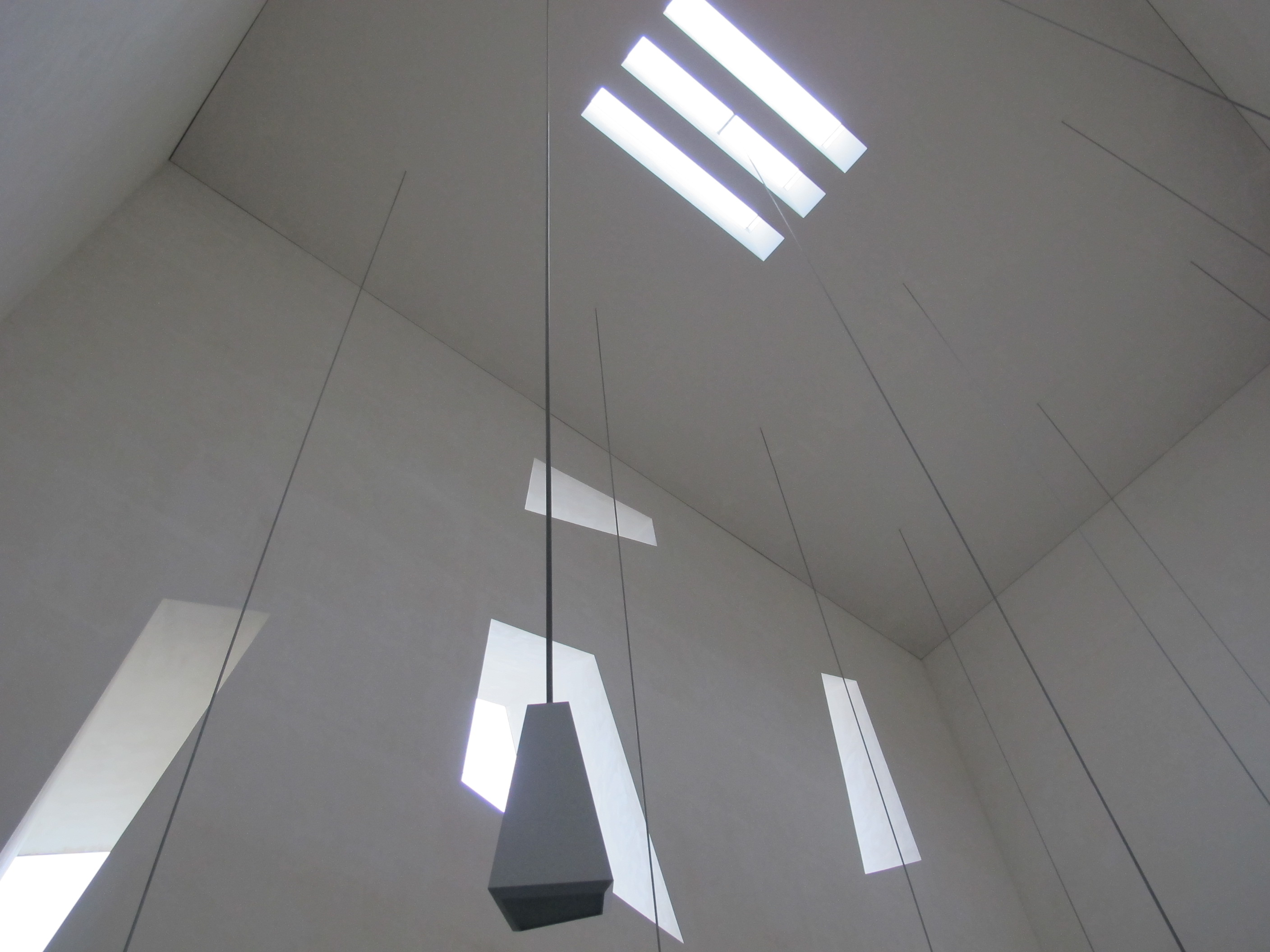 Foligno, San Paolo Apostolo